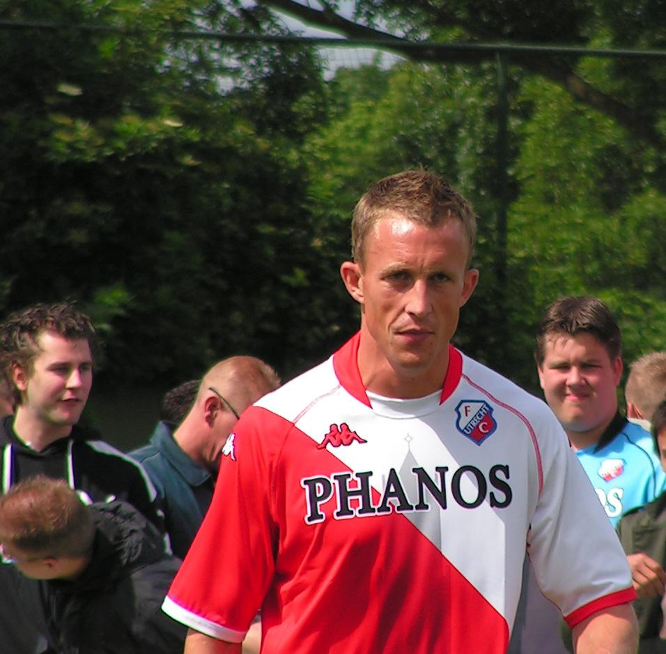 Nederlands voetballer Tim Cornelisse in het tenue van FC Utrecht